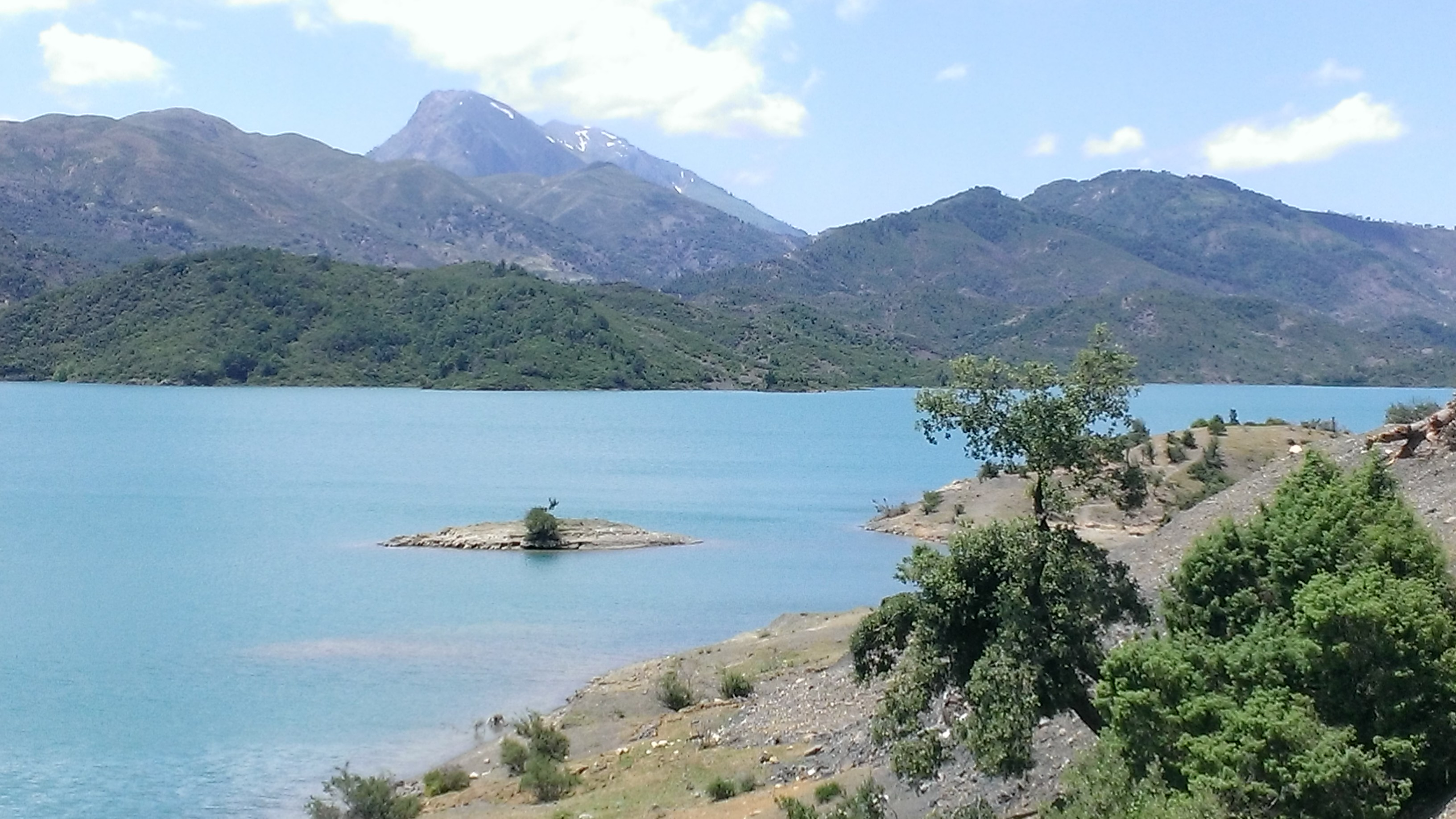 Barrage d'Erraguene, Wilaya de Jijel (Algérie)